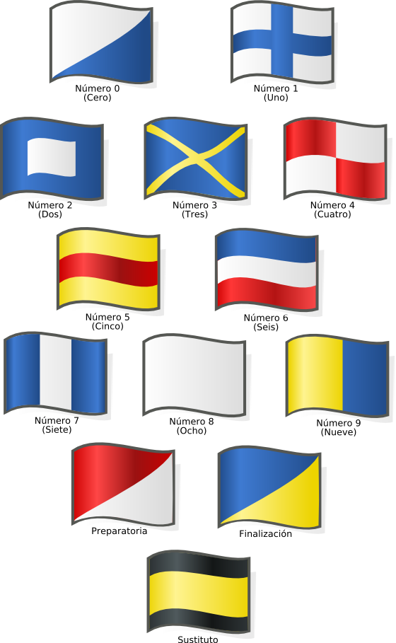 sistema de Banderas de la Marina Británica en el siglo XIX, diseñado por Sir Home Riggs Popham.